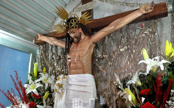 Camarin del Cristo de Esquipulas